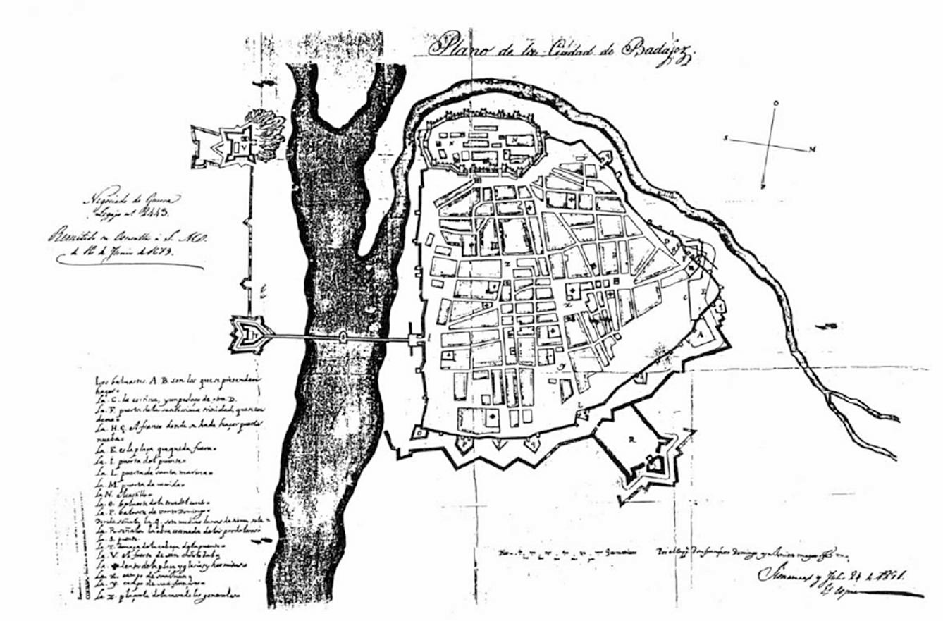 Plano de Badajoz en 1679, por Francisco Domingo.